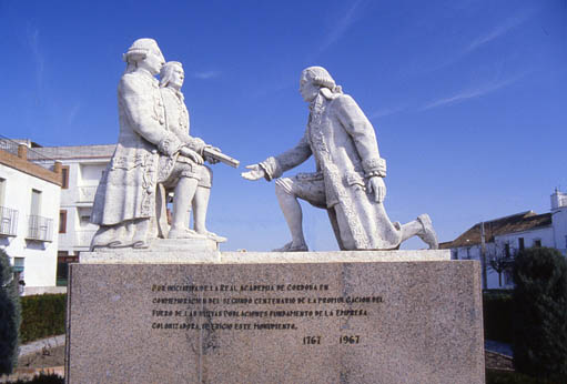 Monumento en La Carlota, (provincia de Córdoba), erigido para conmemorar el segundo centenario del decreto de creación de las Nuevas Poblaciones de Andalucía. Aparecen el rey Carlos III, el ministro Campomanes y Pablo de Olavide (arrodillado). Autor: Rafaelji. Original en diapositiva de 35 mm. tomada en 1989. Categoría:Monumentos (imagen)